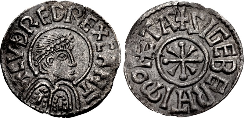 Pêni de Cutredo diademado com nome do cunhador Sigeberto